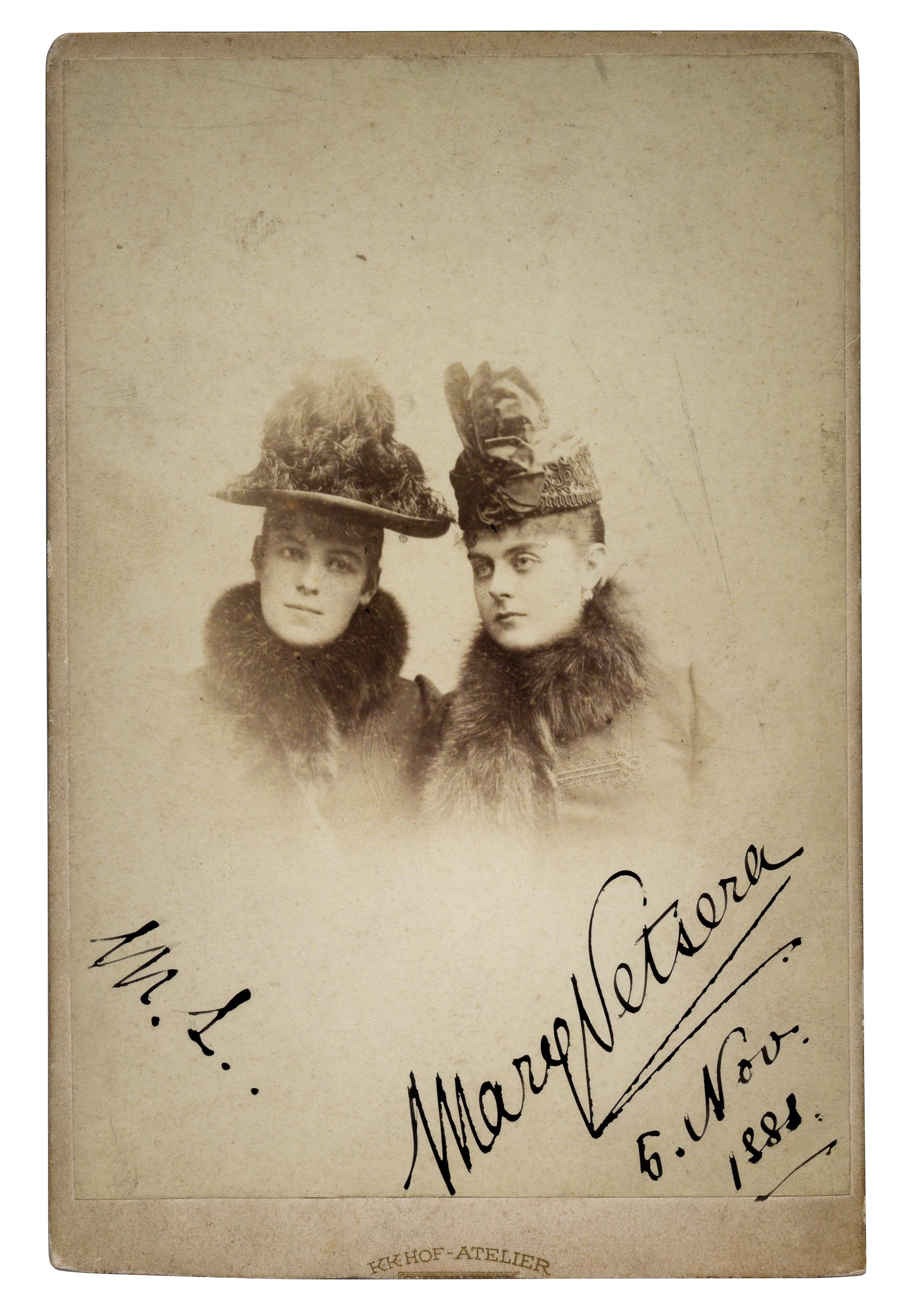 Marie Baroness Vetsera und Marie Gräfin Larisch, Porträtphoto mit eigenhändigen Unterschriften "Mary Vetsera 6. Nov. 1888" und "M. L.", Hofphotograf Adele, leicht beschnitten, 16,5 x 11 cm